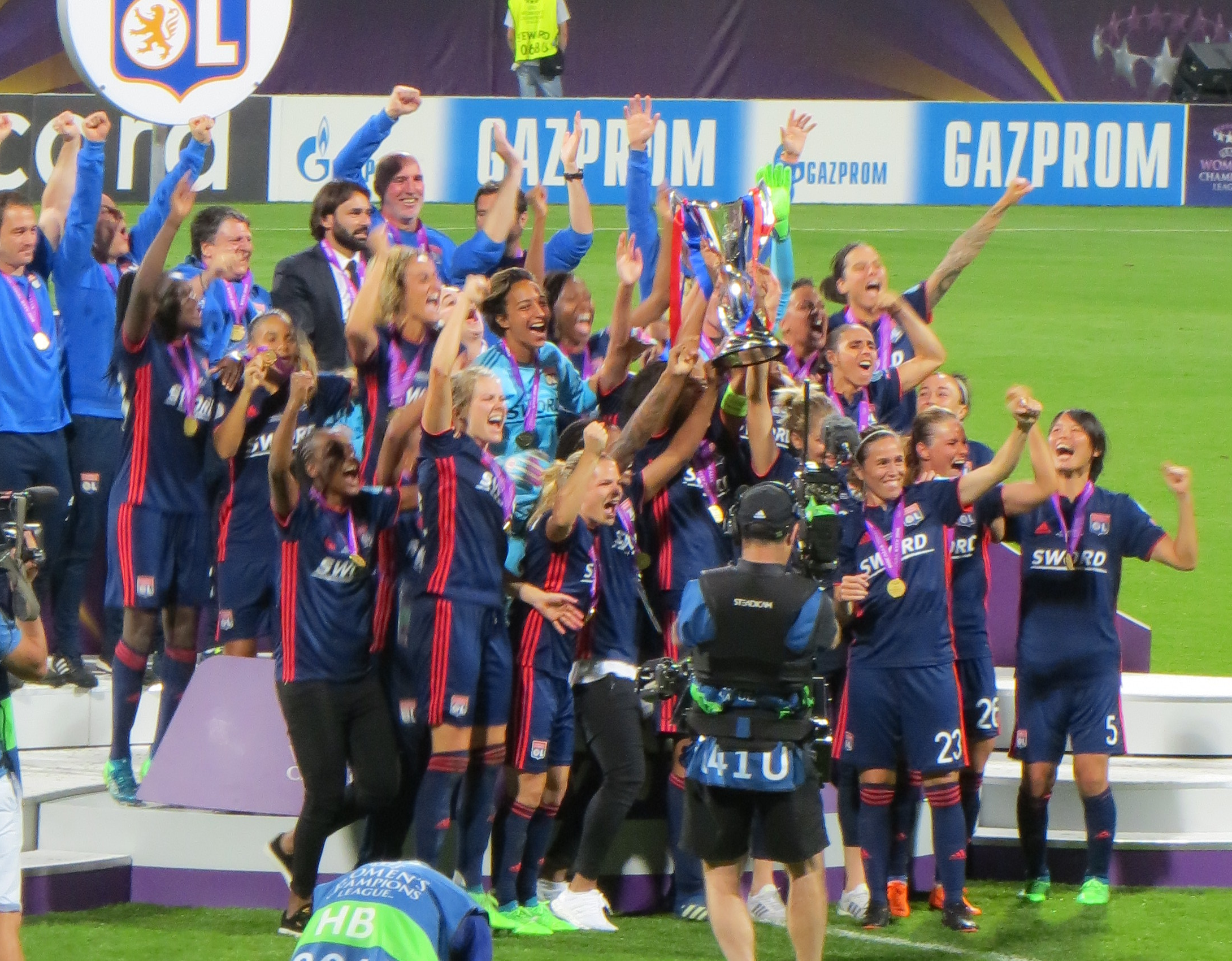 Фінал жіночої Ліги чемпіонів 2018 у Києві. Вольфсбург - Ліон 1:4